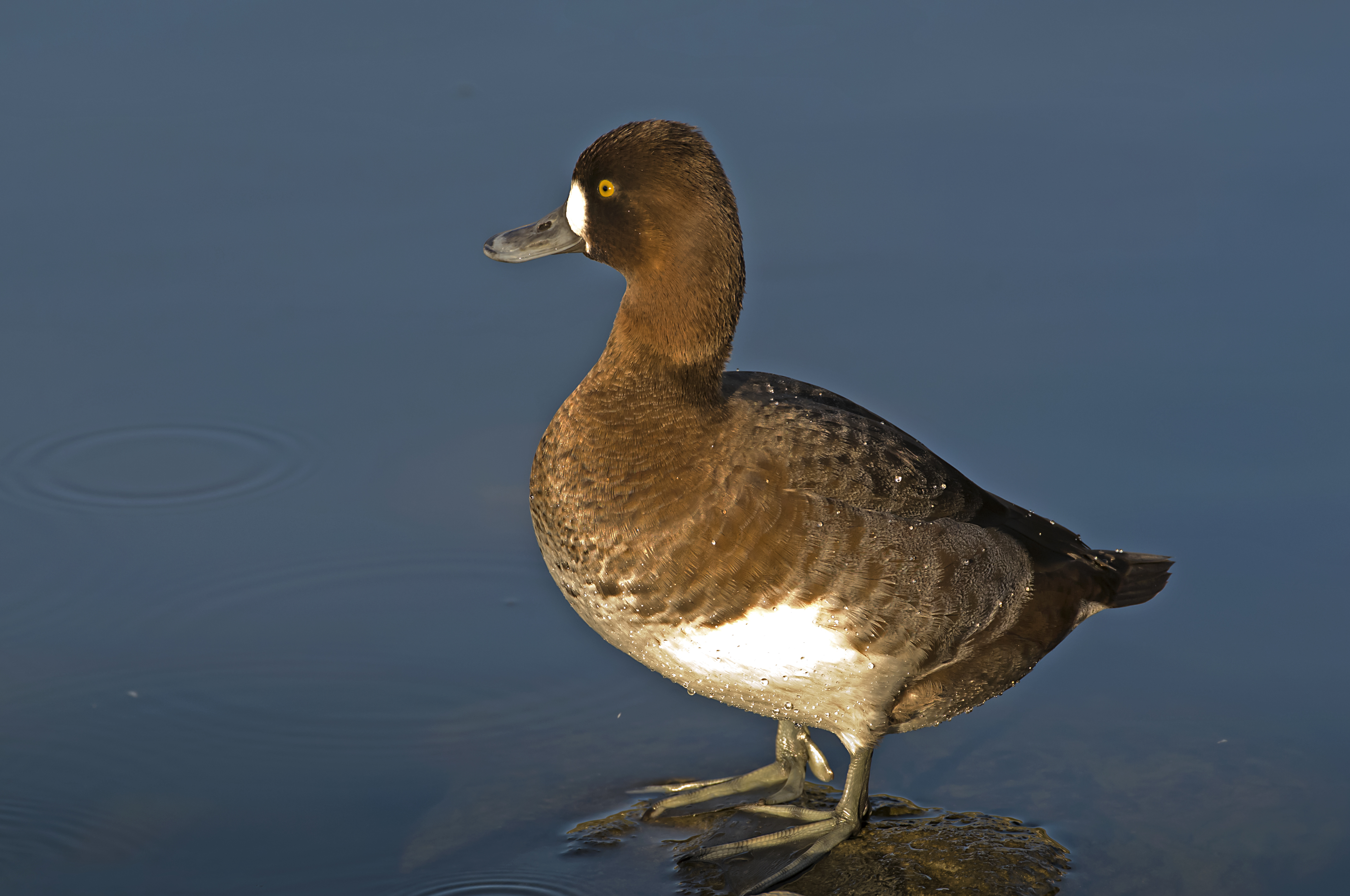 Es la tercera cita de éste ave divagante americana en Gran Canaria. San Bartolomé de Tirajana (Gran Canaria).